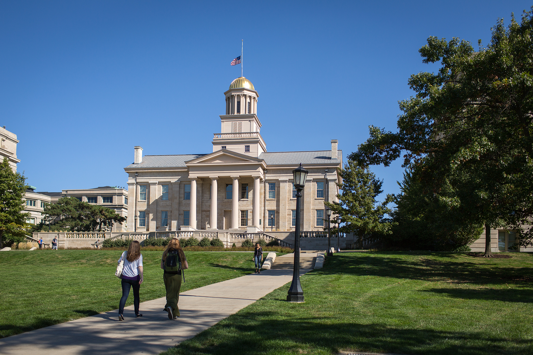 Старое здание капитолия штата Айова, в настоящее время университеский корпус и музей